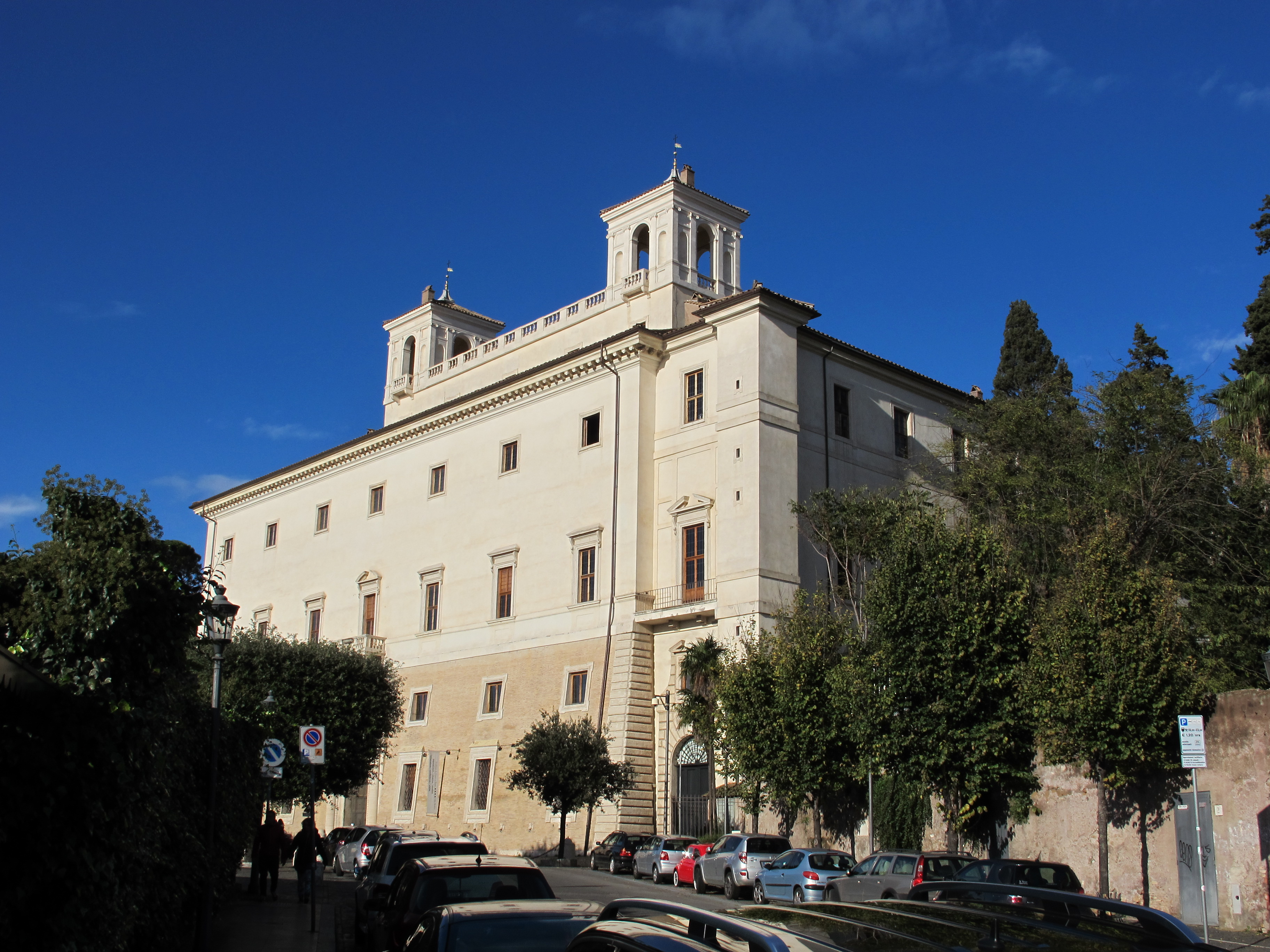 Villa Medici, Roma